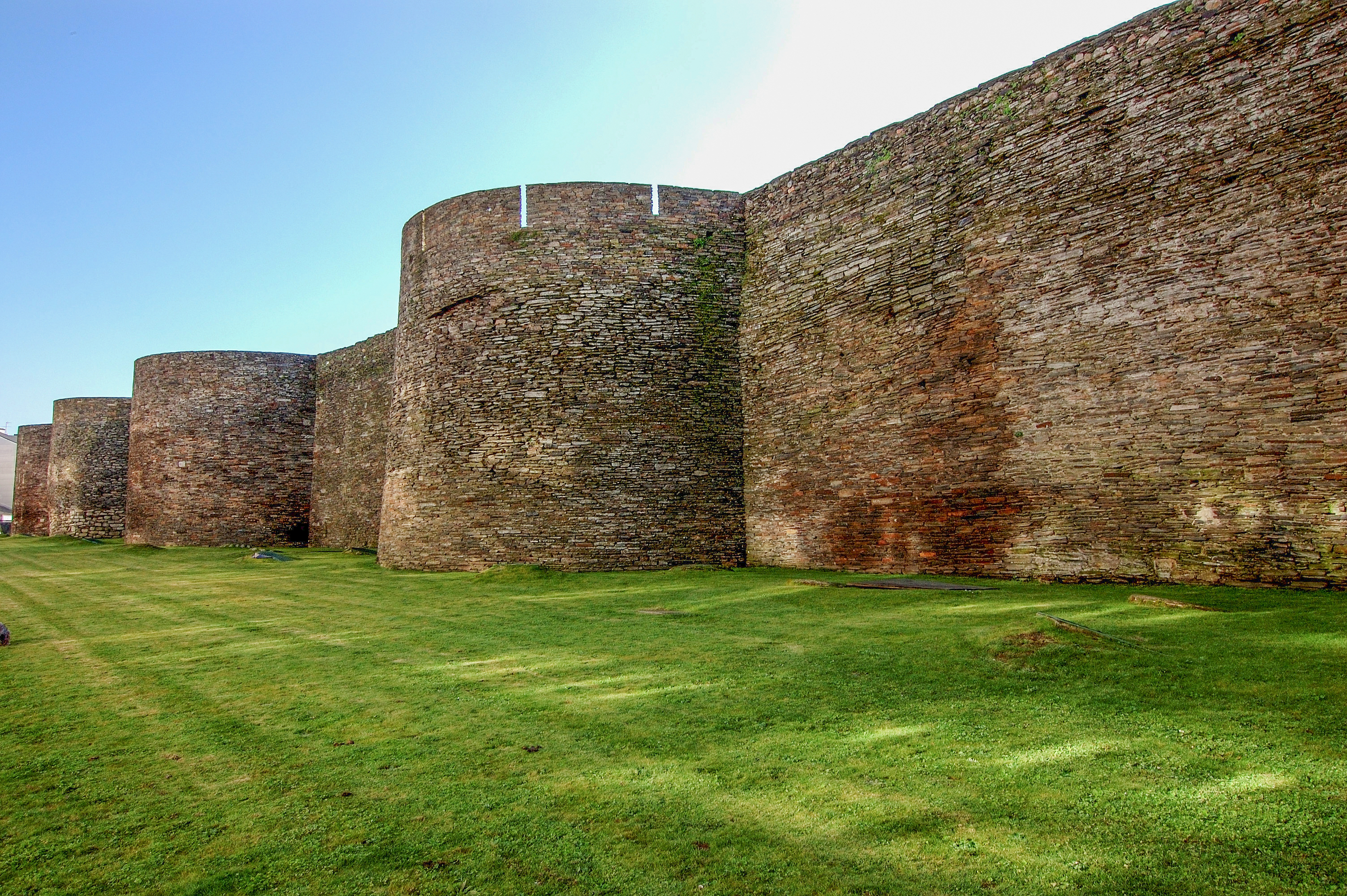 Lugo, Galicia, Spain [2006]'Muralla, Calicia [2006]'